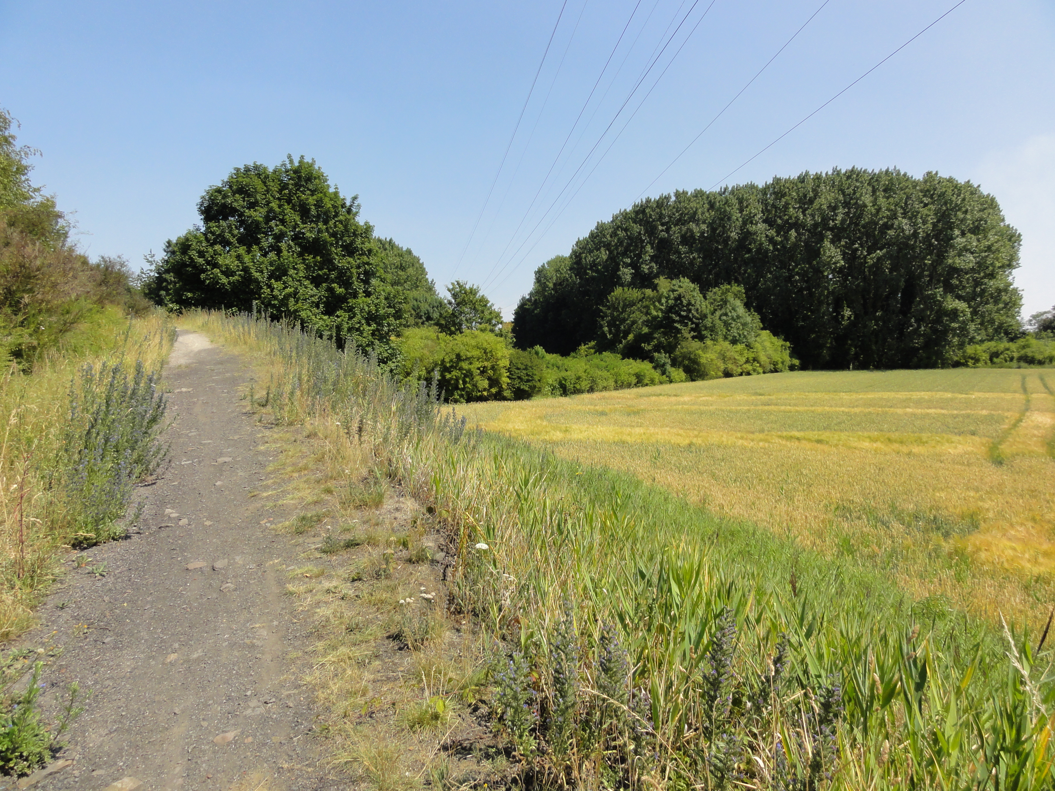 Terril n° 213D dit Cavalier de Roost-Warendin, Compagnie des mines de l'Escarpelle dans le bassin minier du Nord-Pas-de-Calais, Auby, Nord, Nord-Pas-de-Calais, France.